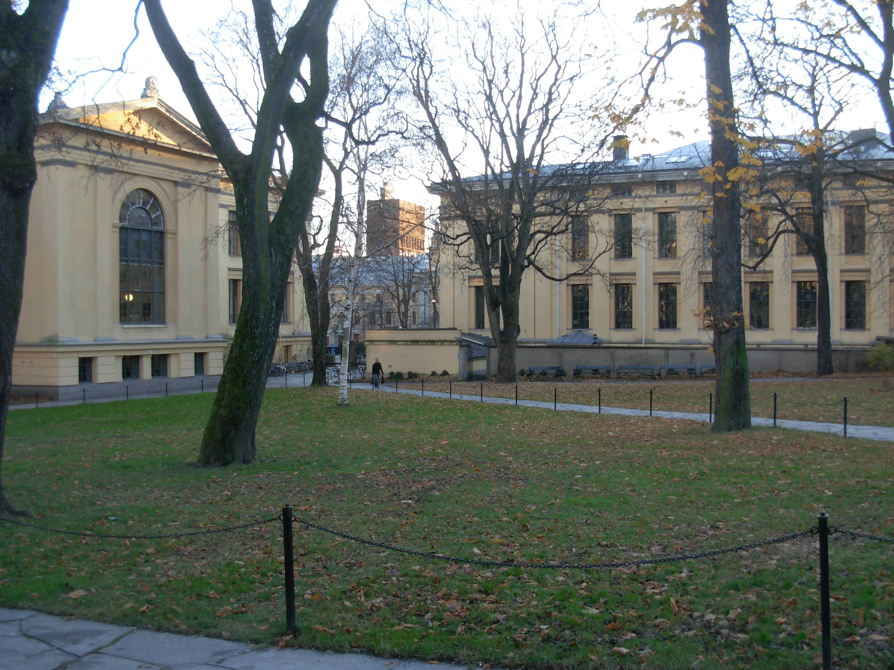 Universitetshagen, Oslo